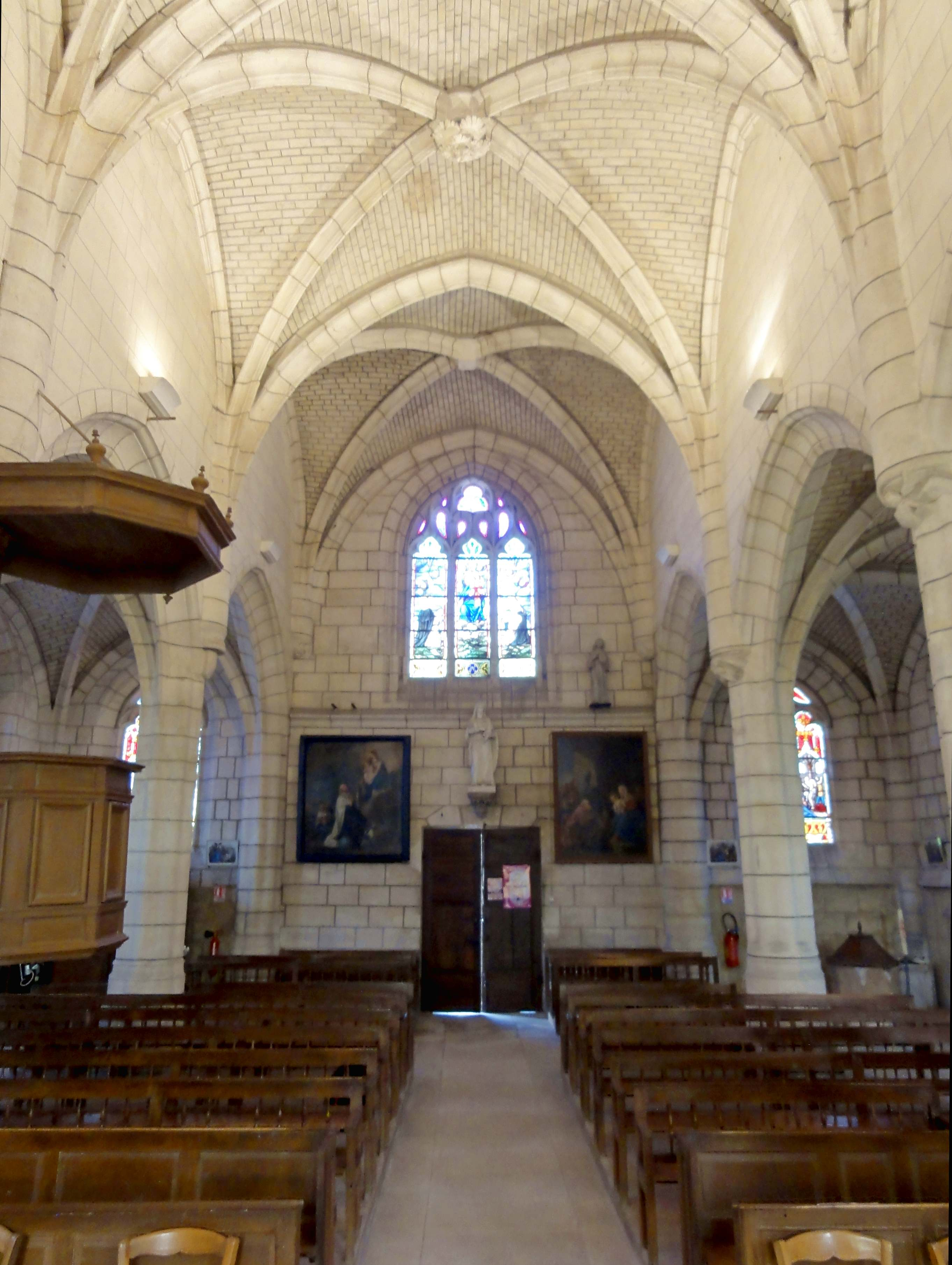 Intérieur de l'église (voir titre).